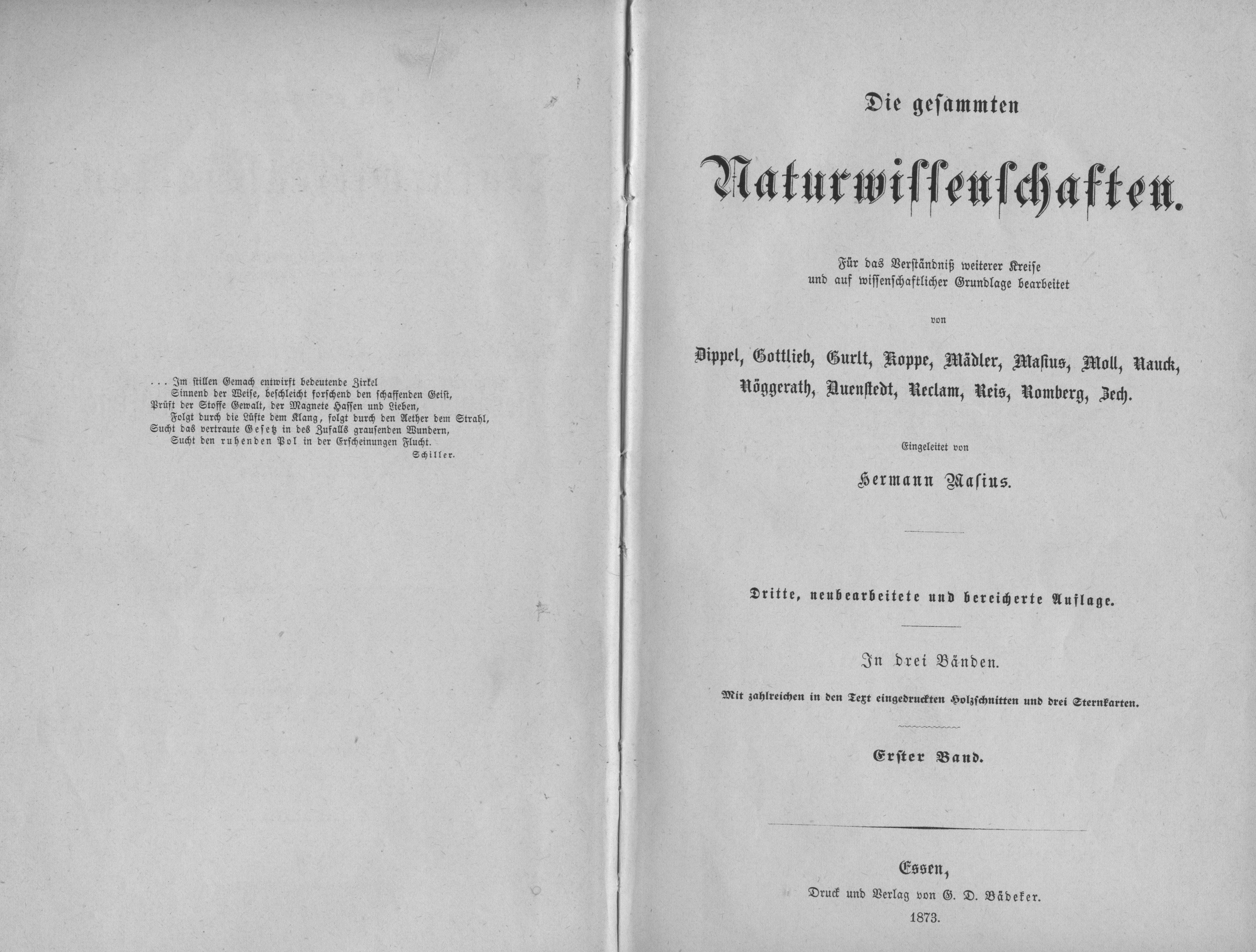 Titelblatt des 1873 erschienen Buches „Die gesammten Naturwissenschaften“